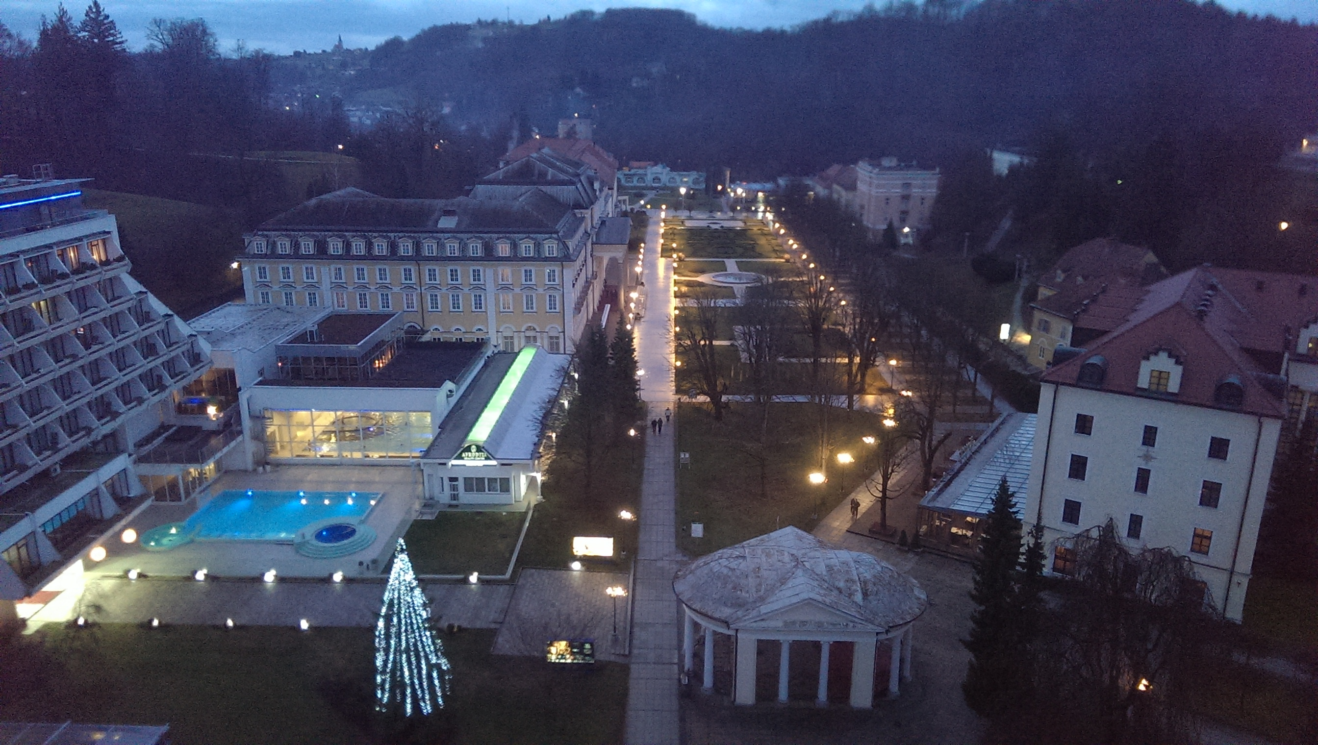 Pogled na osrednji park zdravilišča Rogaška iz stavbe Terapije.